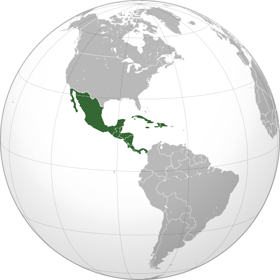 Mexico, America Central y el Caribe